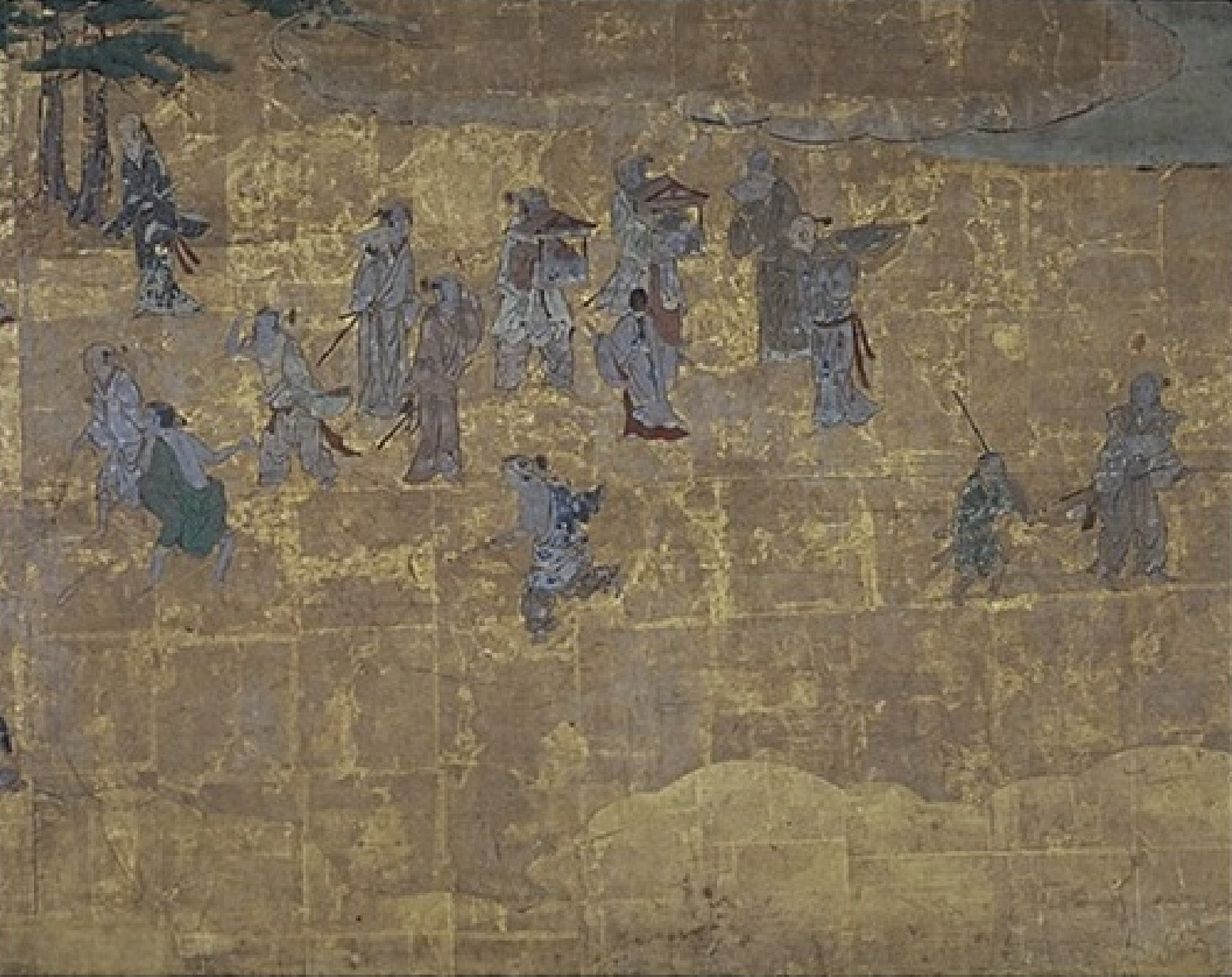 Painting of Sumiyoshi Shrine